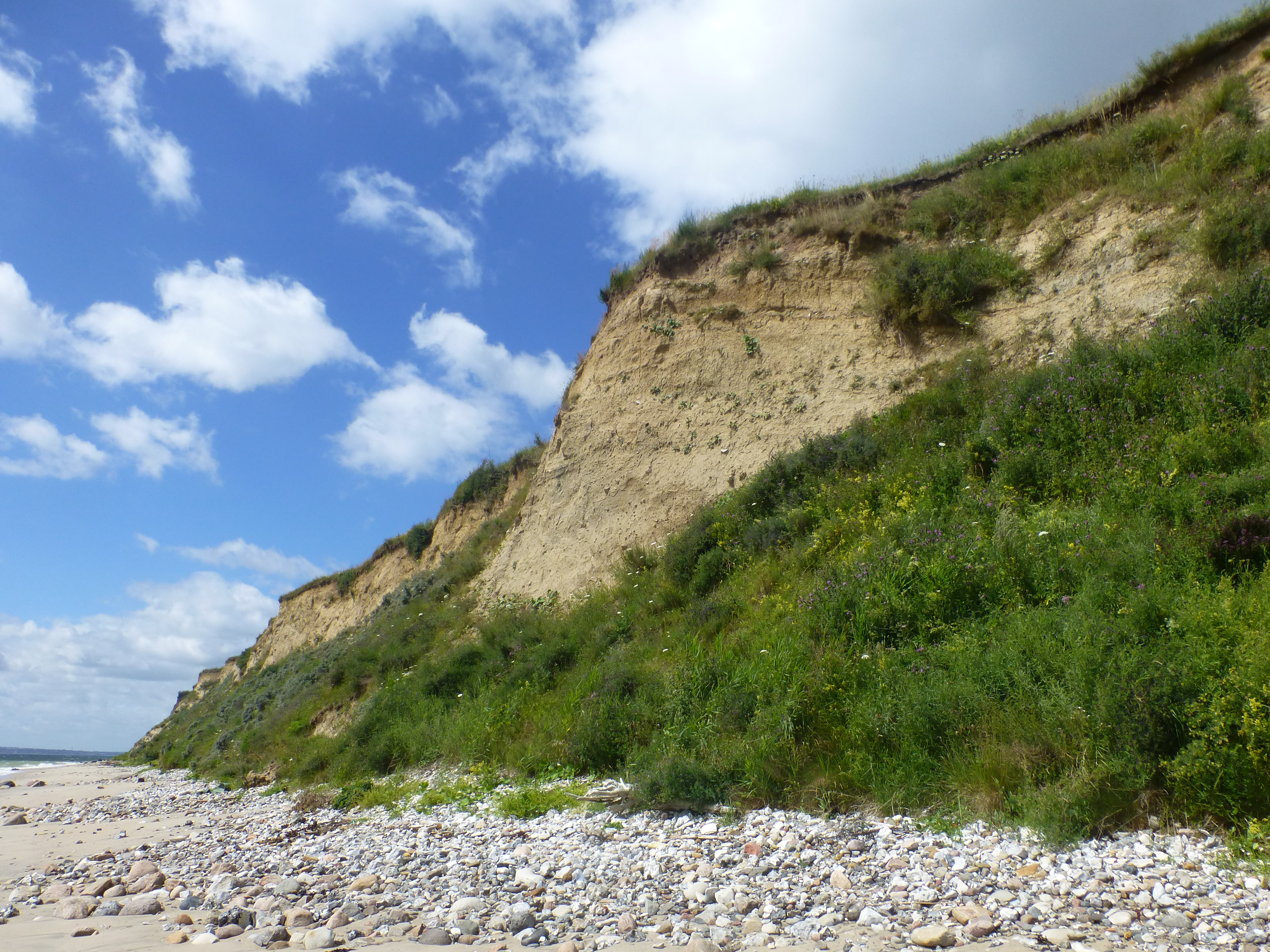 Mols Hoved set mod vest